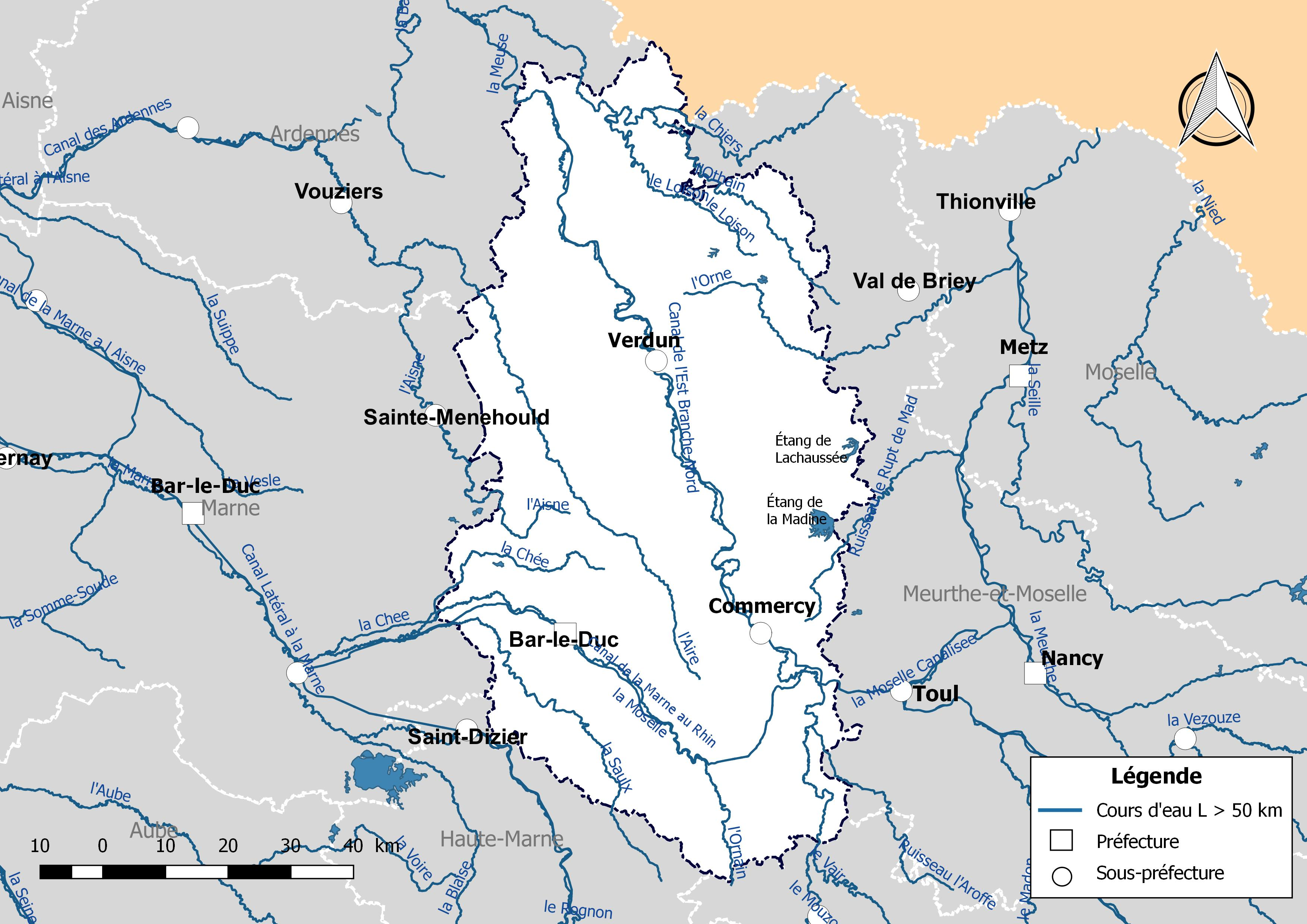 Carte des cours d'eau de longueur supérieure à 50 km drainant le département de la Meuse (France).